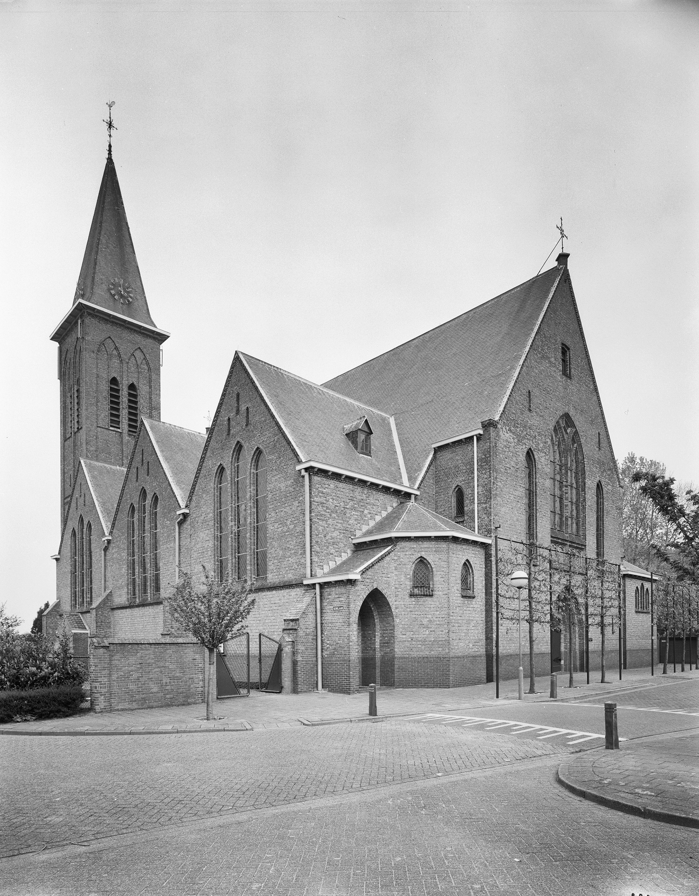 Sint Philippus En Jacobuskerk: Overzicht noordwestgevel met bovenste gedeelte kerktoren (opmerking: Gefotografeerd voor Monumenten In Nederland Zeeland, bladzijde 147)